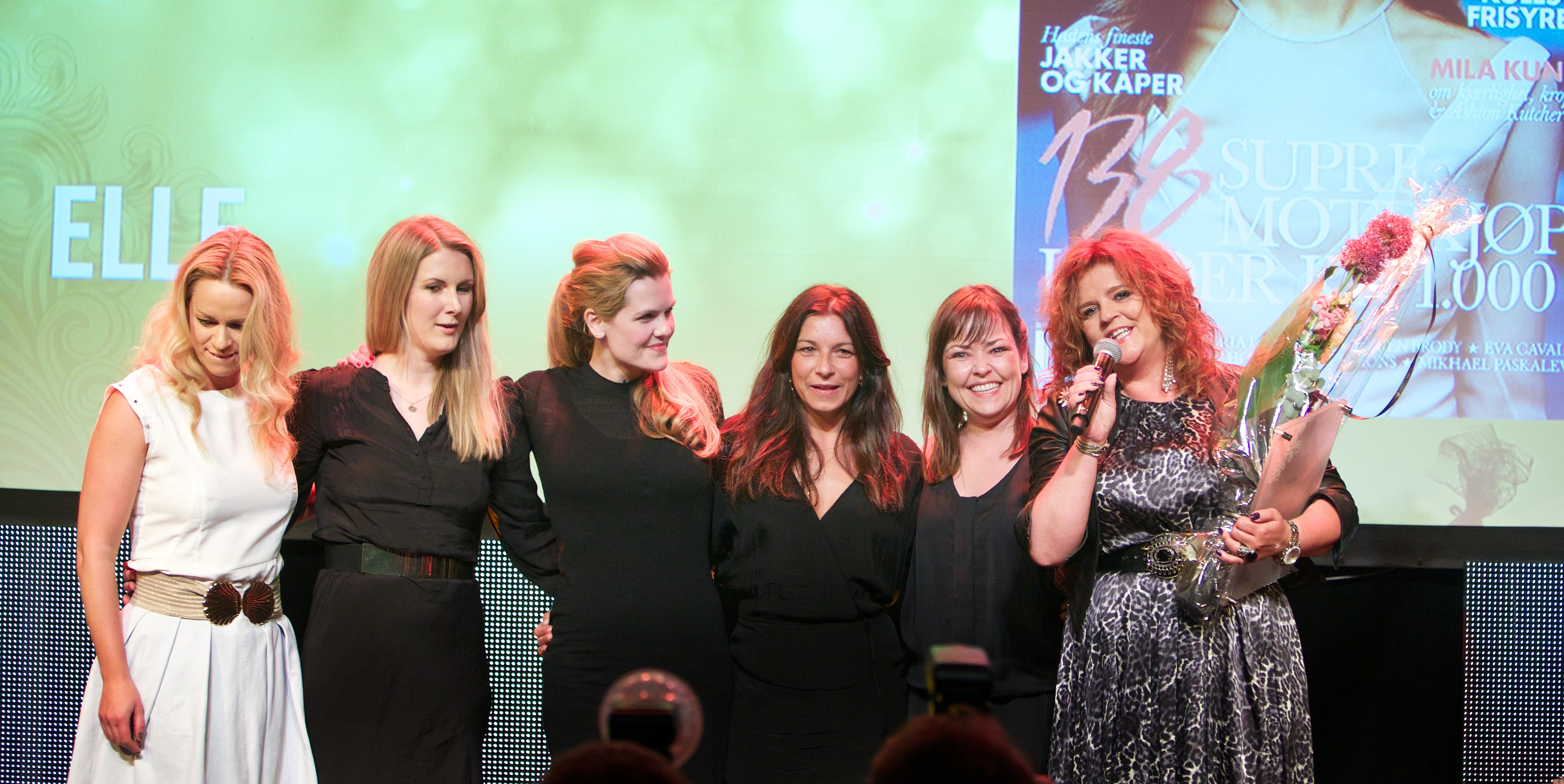 Elle.